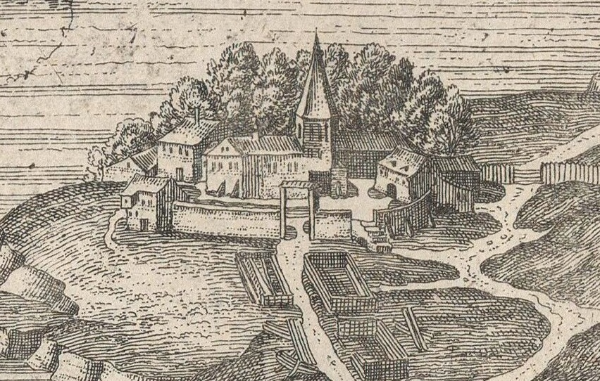 Klara priory